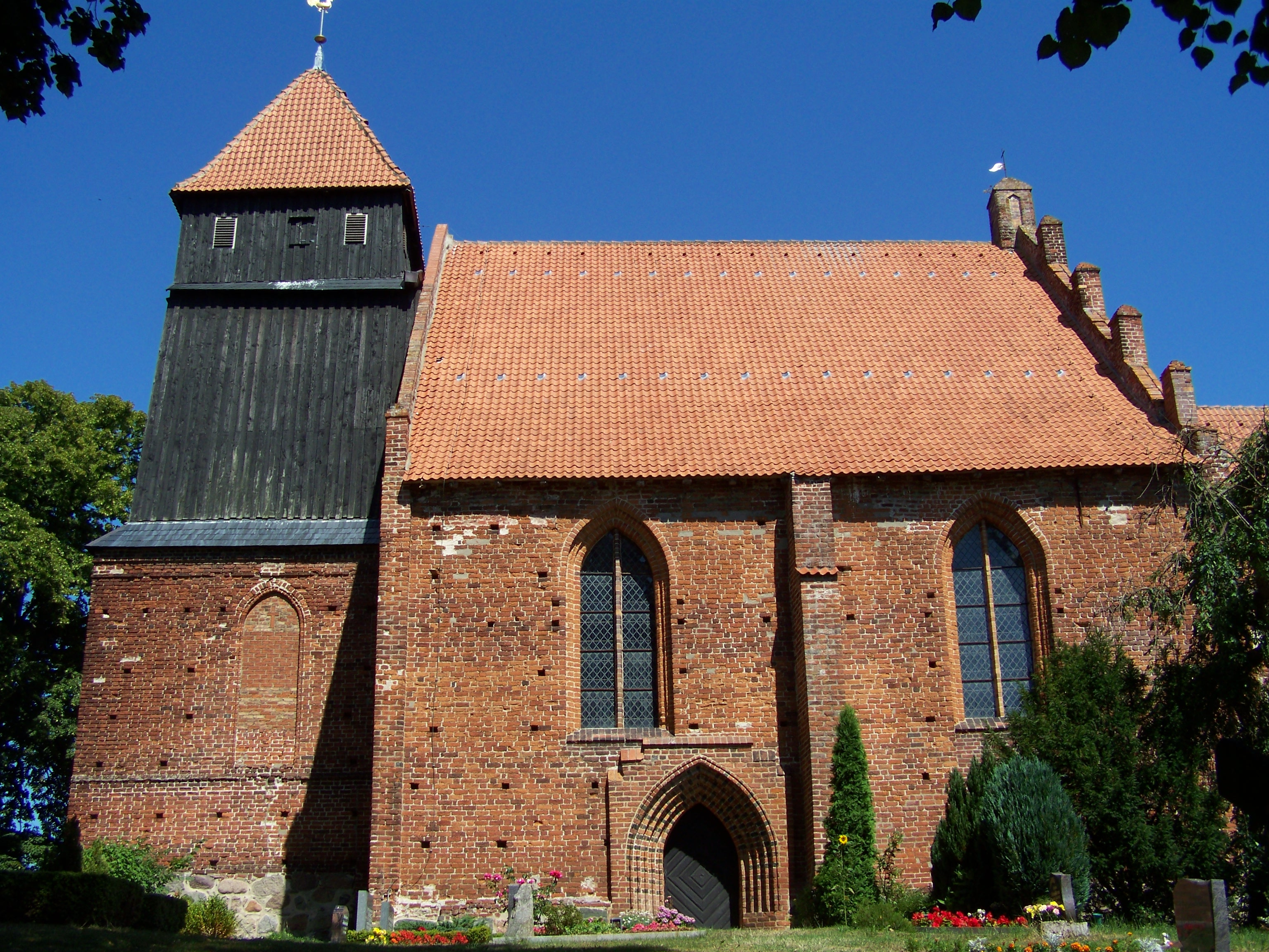 Gesamtansicht der Dorfkirche in Reinberg.